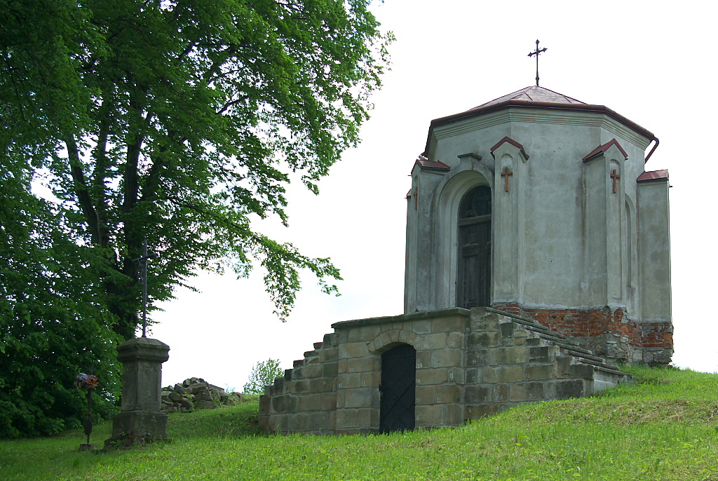 Kaplica grobowa Rylskich i Tchórznickich z XIX wieku, Dąbrówka Sanok Aleja NMP